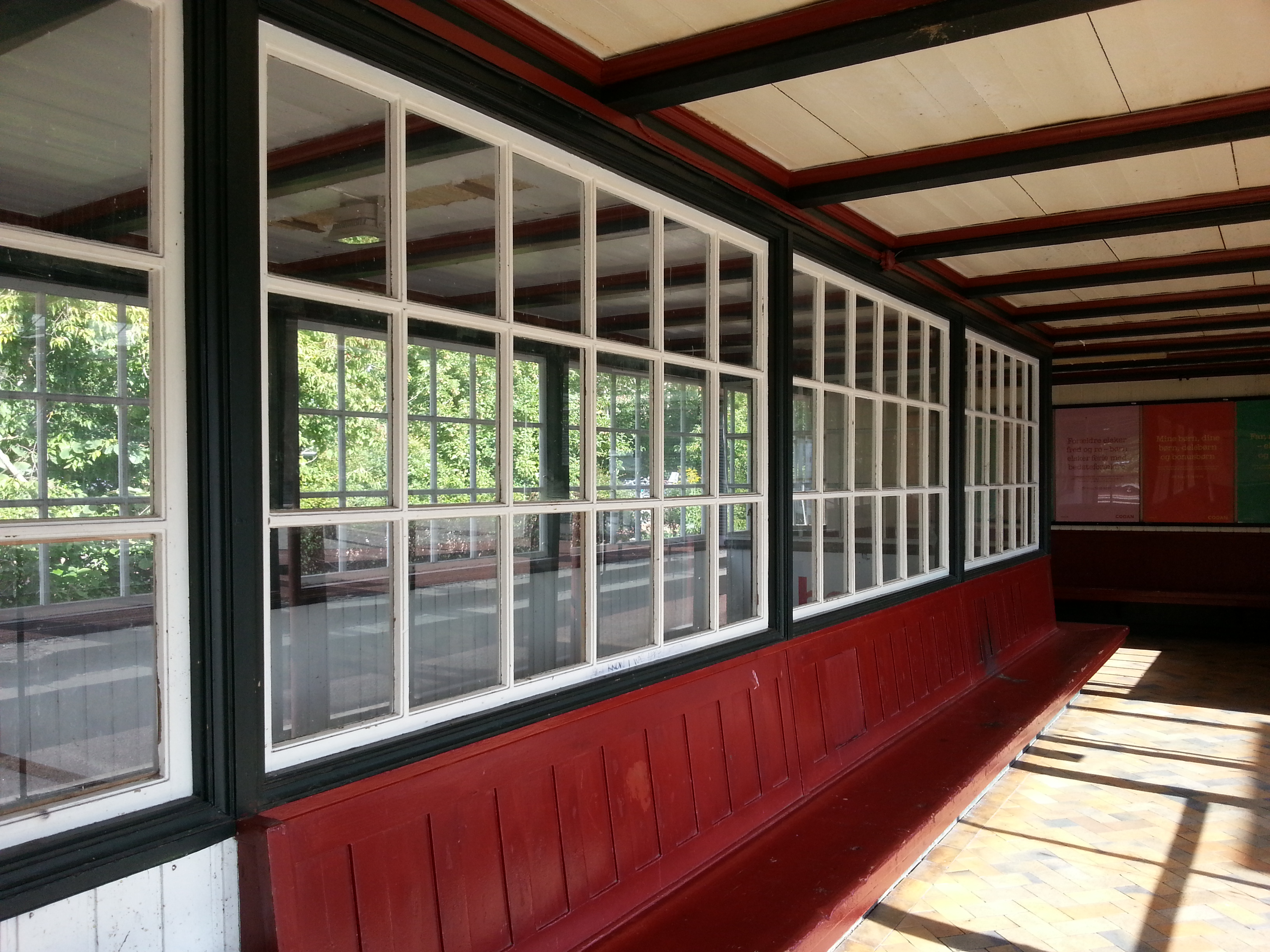 Ventesalen på Espergærde stations vestside